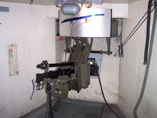 Heldsberg MG Stand